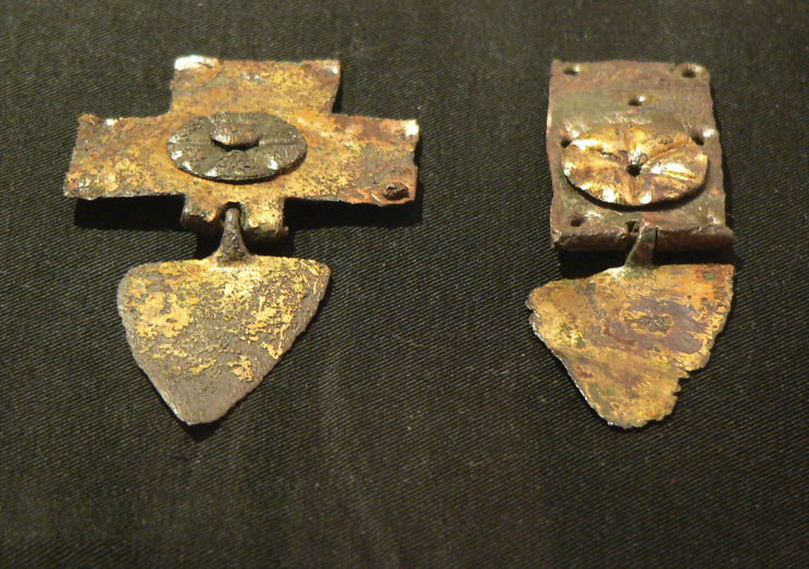 Zaumzeugteile als Funde von Hus Aren, ausgestellt im Museum Bückeburg